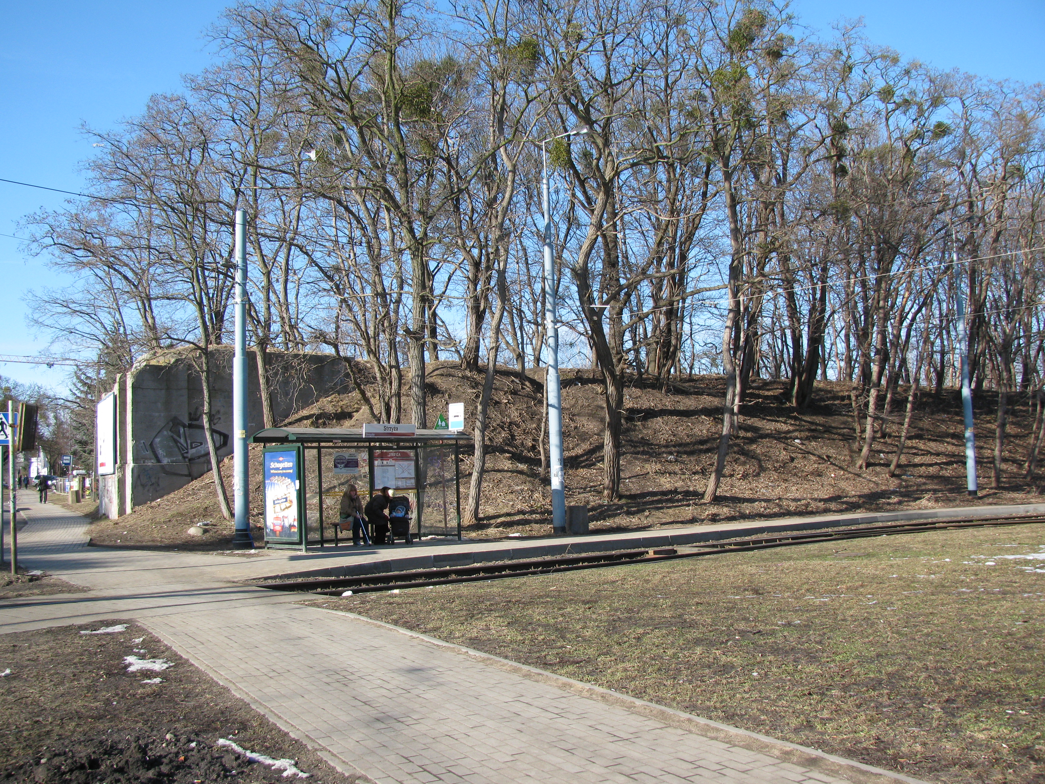 Gdańsk Strzyża, pętla tramwajowa i przystanek tramwajowy. W tle nasyp i resztki wiaduktu dawnej linii kolejowej do Starej Piły.